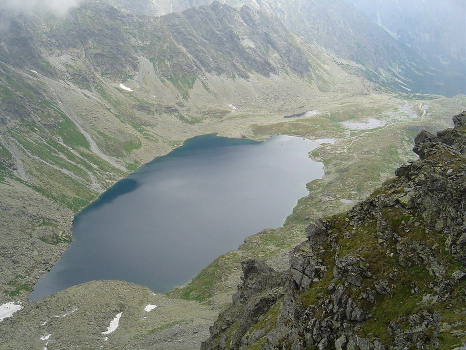 Velke Hincovo pleso